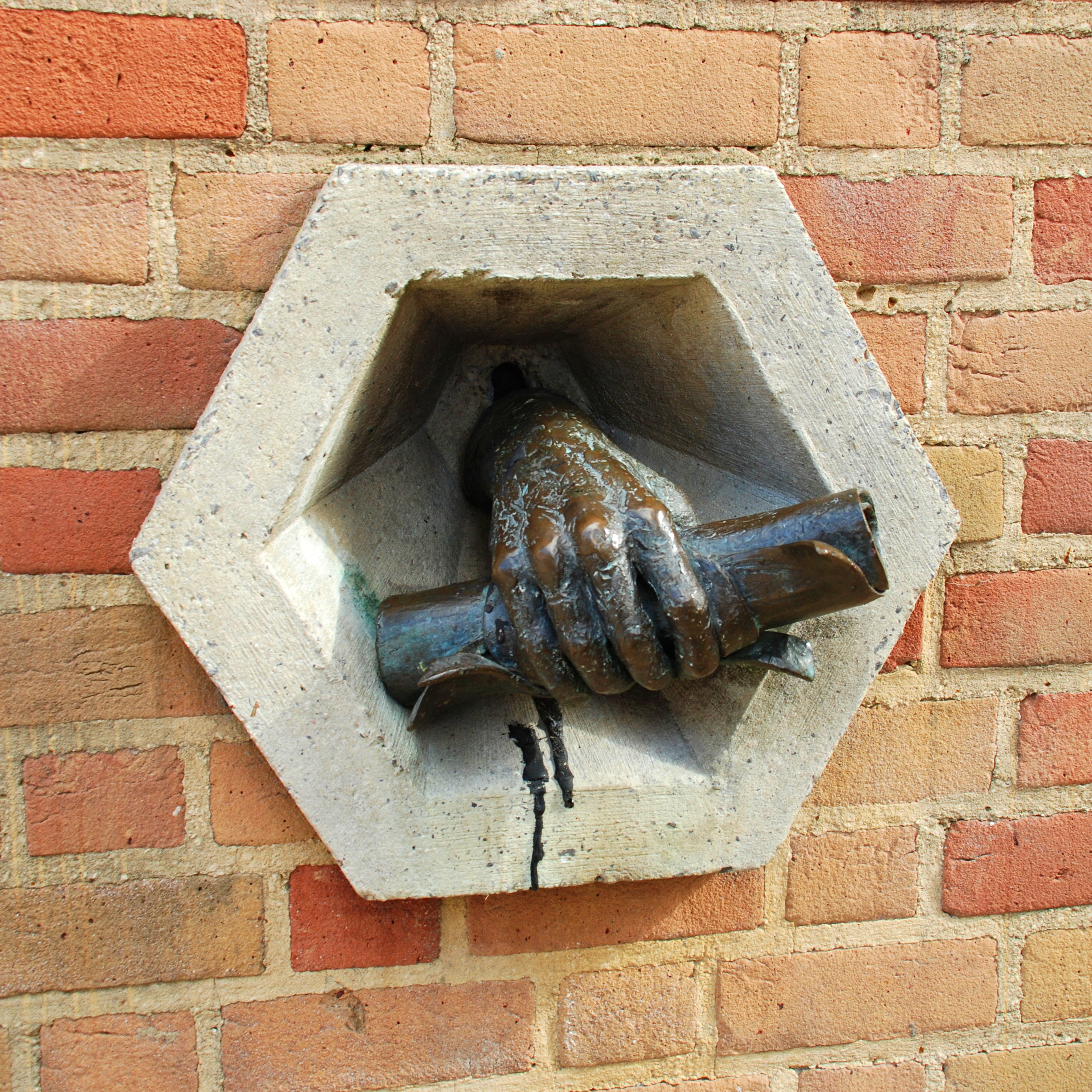 Belgique - Louvain-la-Neuve - La main au diplôme (Gigi Warny)